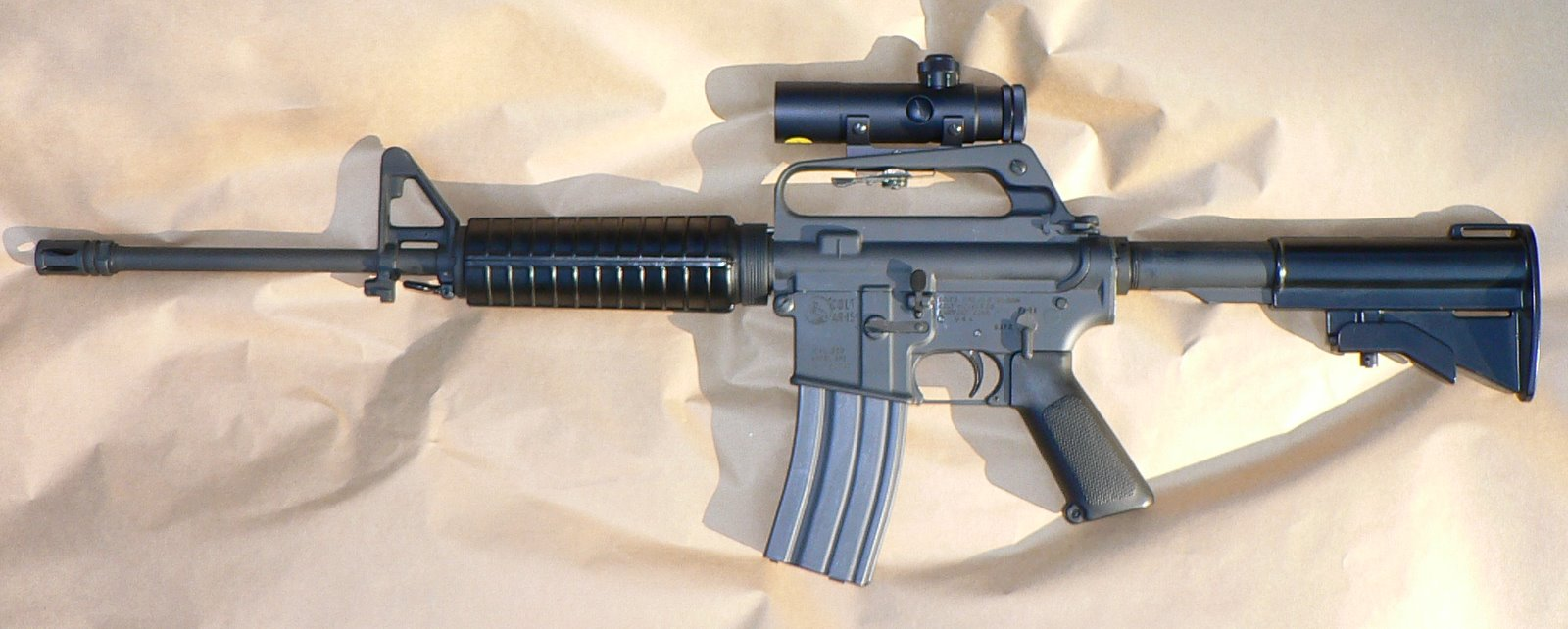 Colt AR-15 Sporter SP1 Carbine